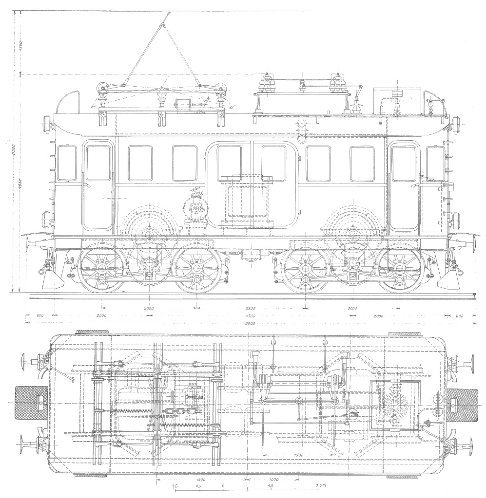 MFO-Lokomotive Nr. 2 Typenskizze